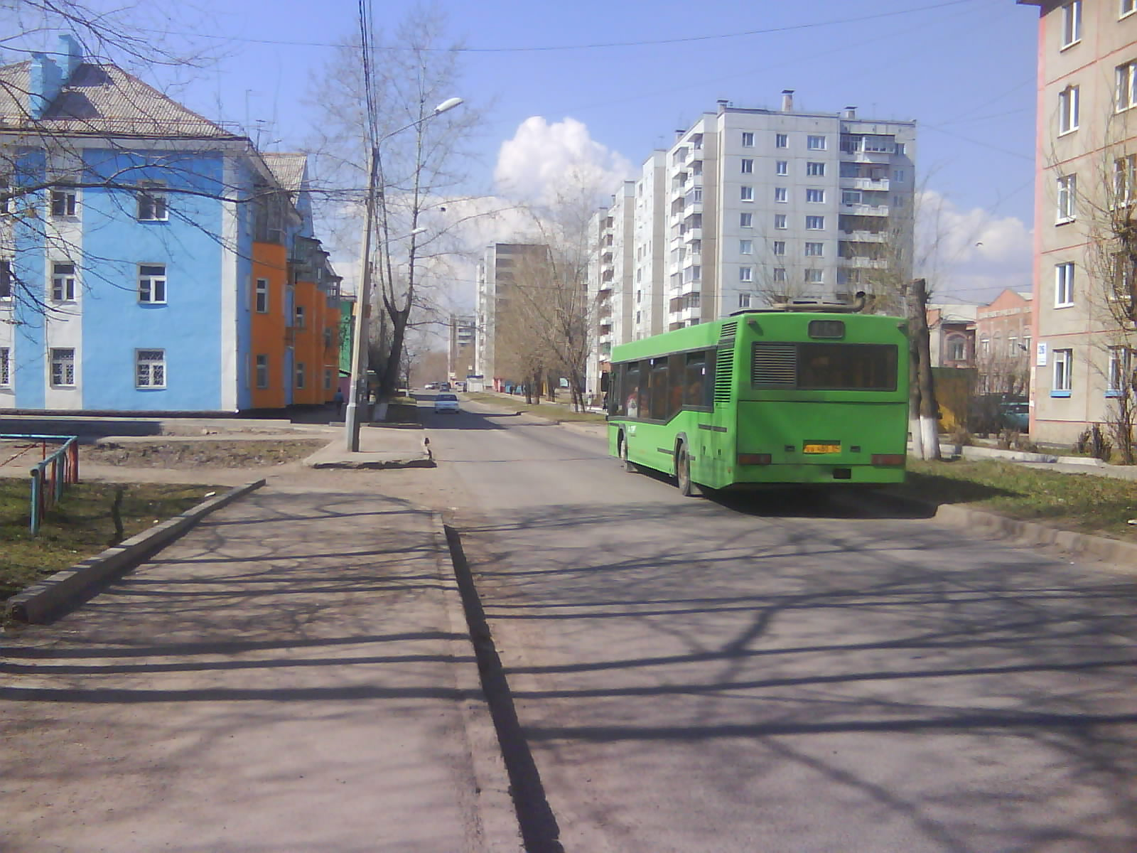 Поселок Энергетиков